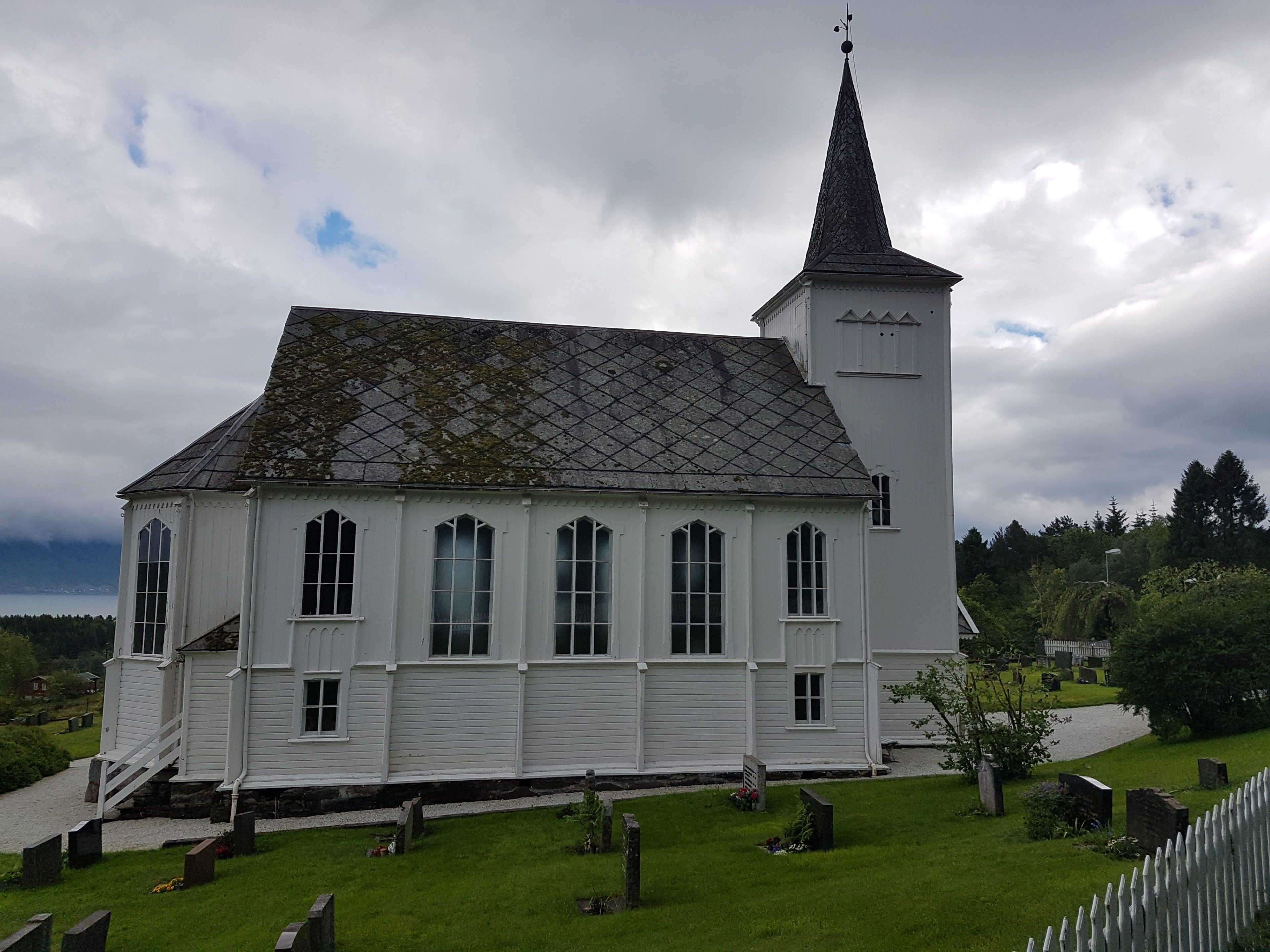 Hatlestrand kirke. Foto: Roger Grimelid. Fra Riksantikvarens Kulturminnesøk.